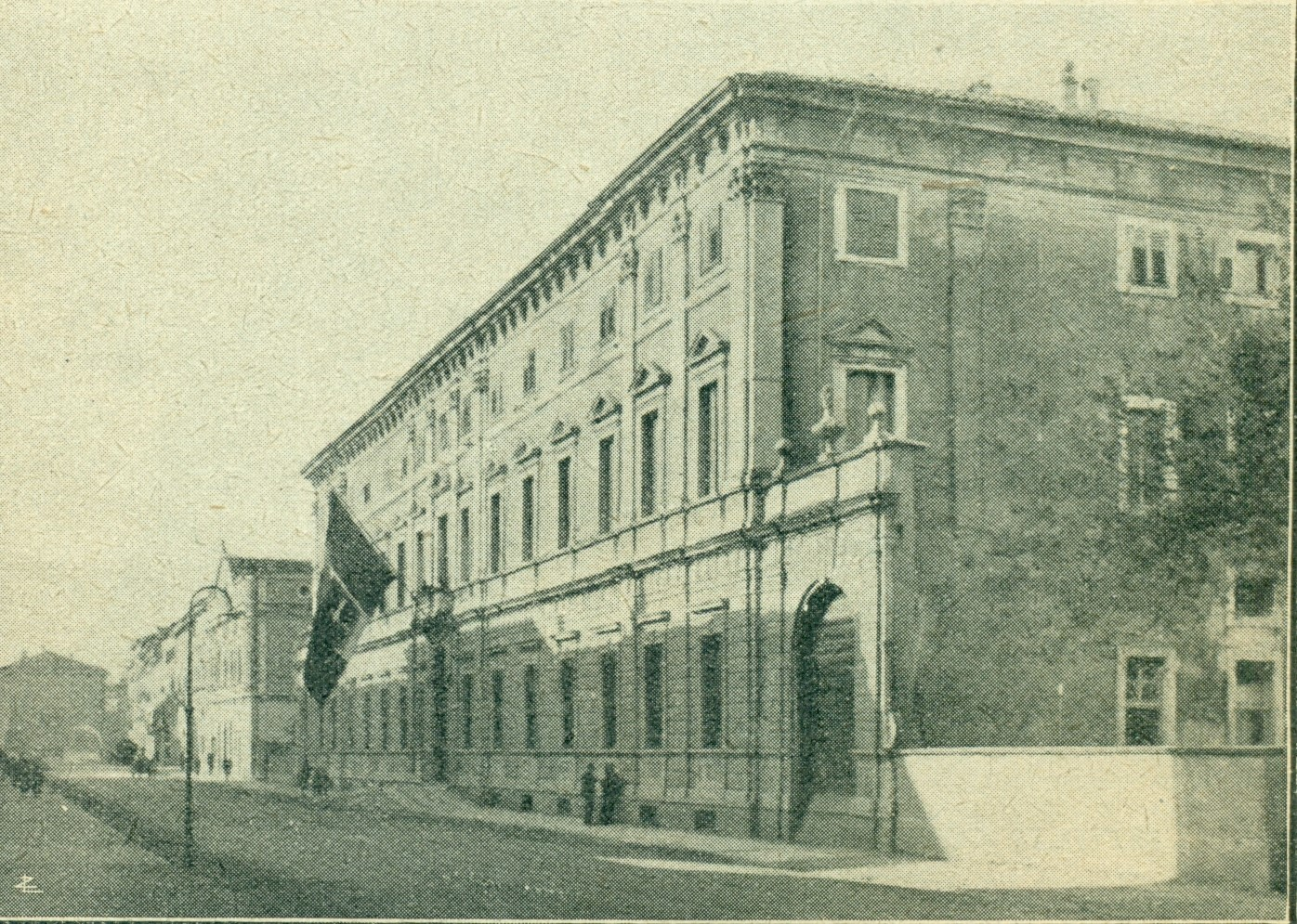 Palazzo Piomarta Foto originale anni 20 - biblioteca personale